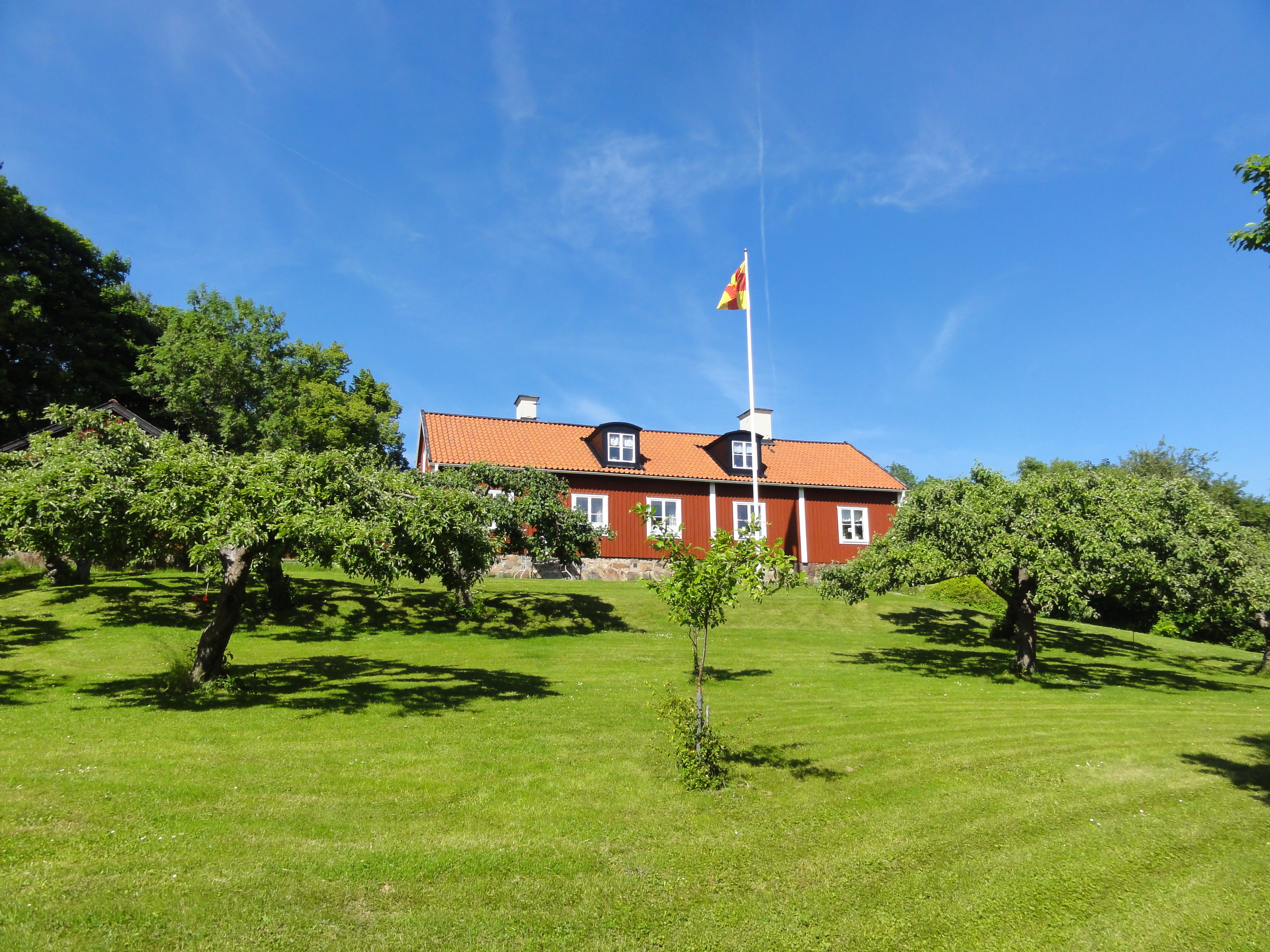 Bromma kyrka, prästgården från söder